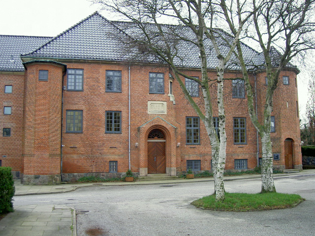 Risskov Kirke from north